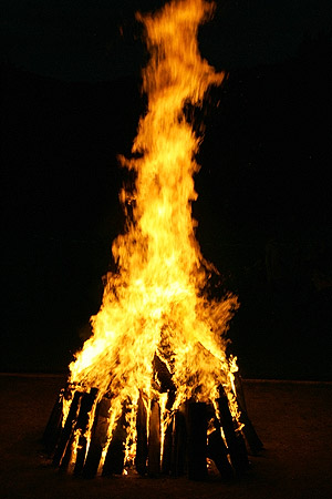 1. August-Feier in Reinach (BL): 1. August-Feuer